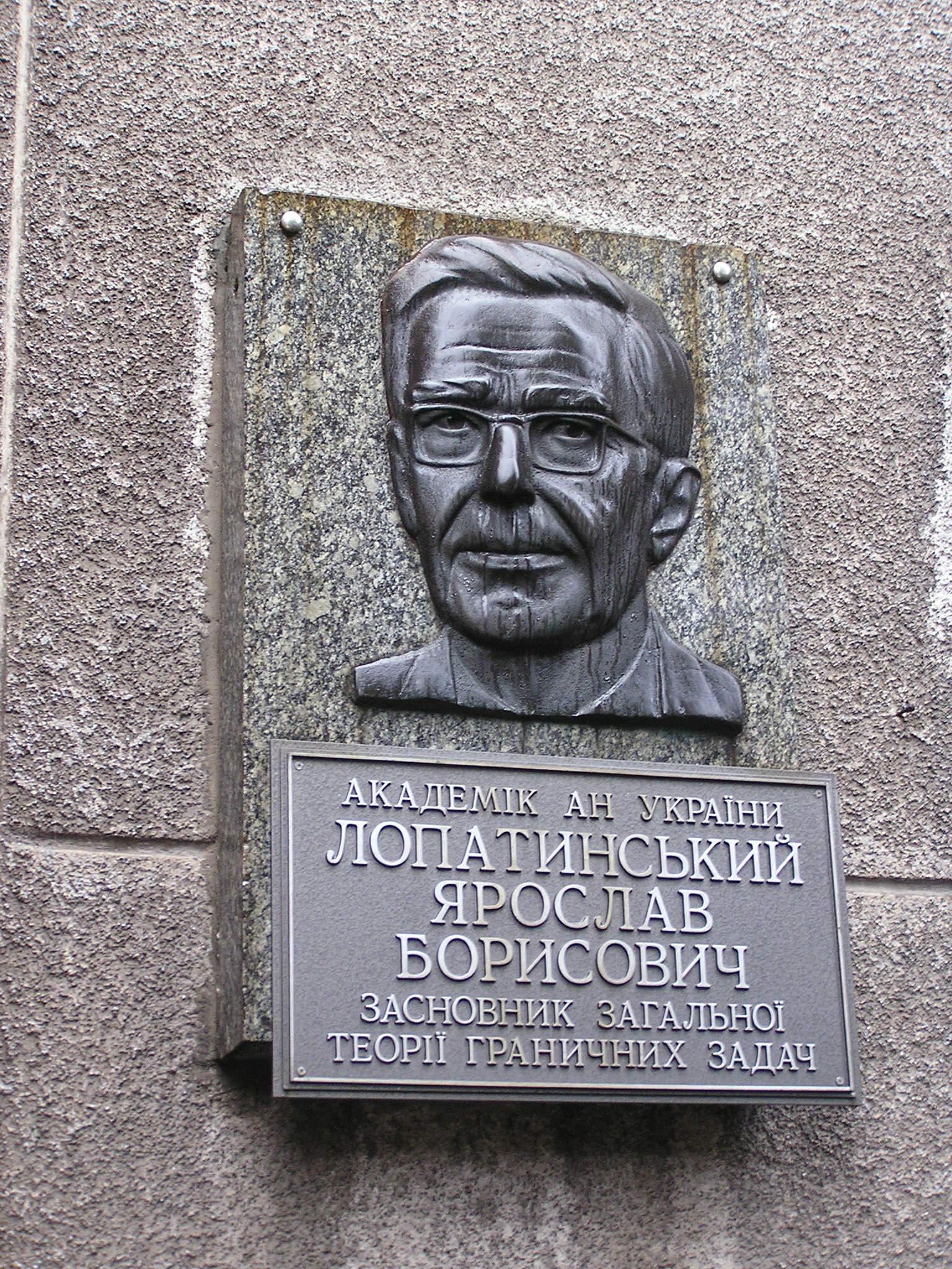 Донецк. Лопатинский, Ярослав Борисович